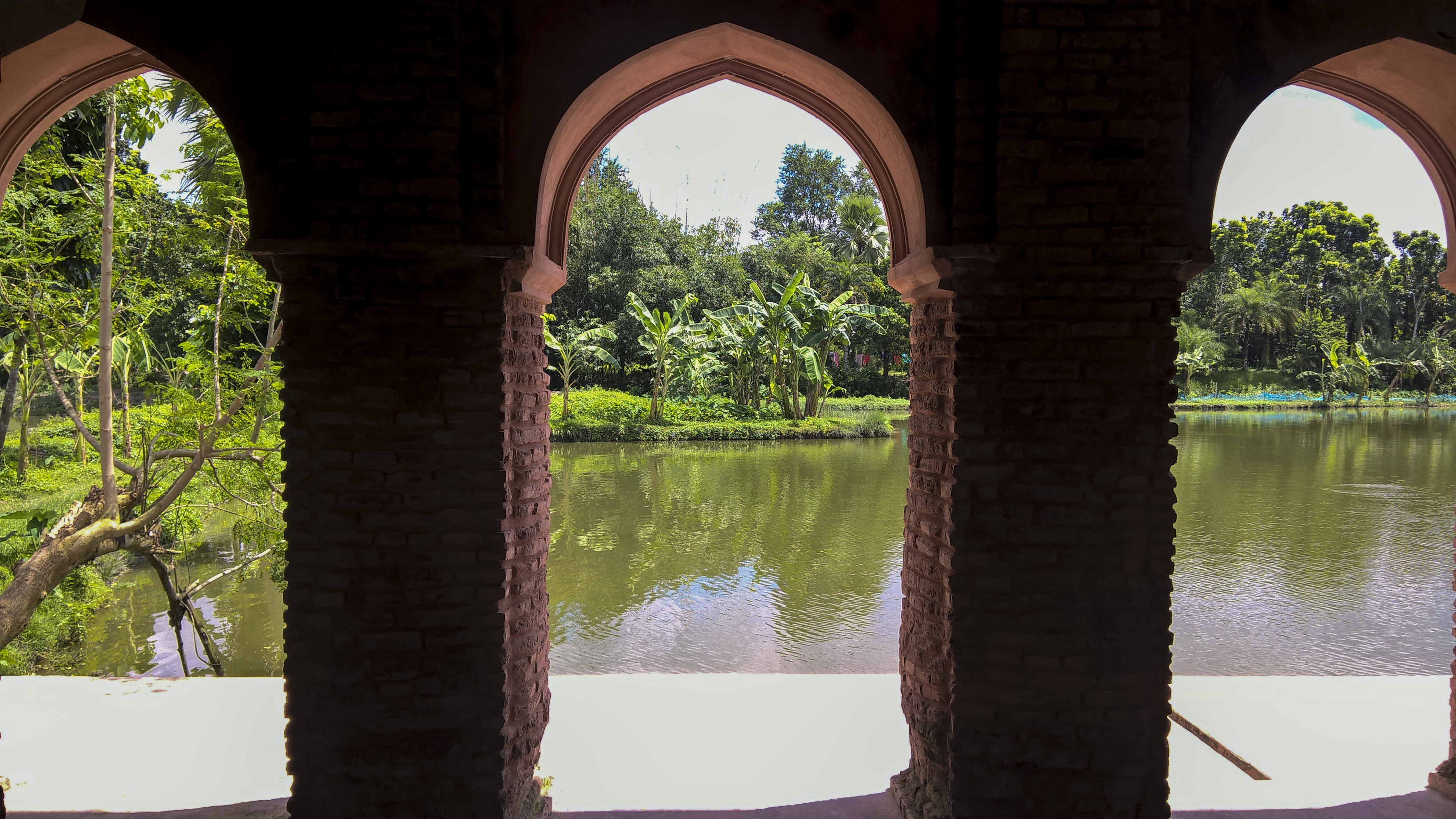 হাওয়া খানা পুঠিয়া রাজশাহী অঞ্চলের অন্যতম একটি প্রত্নস্থান। এটি পুঠিয়া বাজার থেকে ৩ কিলোমিটার দক্ষিন পশ্চিমে অবস্থিত। হাওয়াখানাটি মুলত দ্বিতল ভবন।